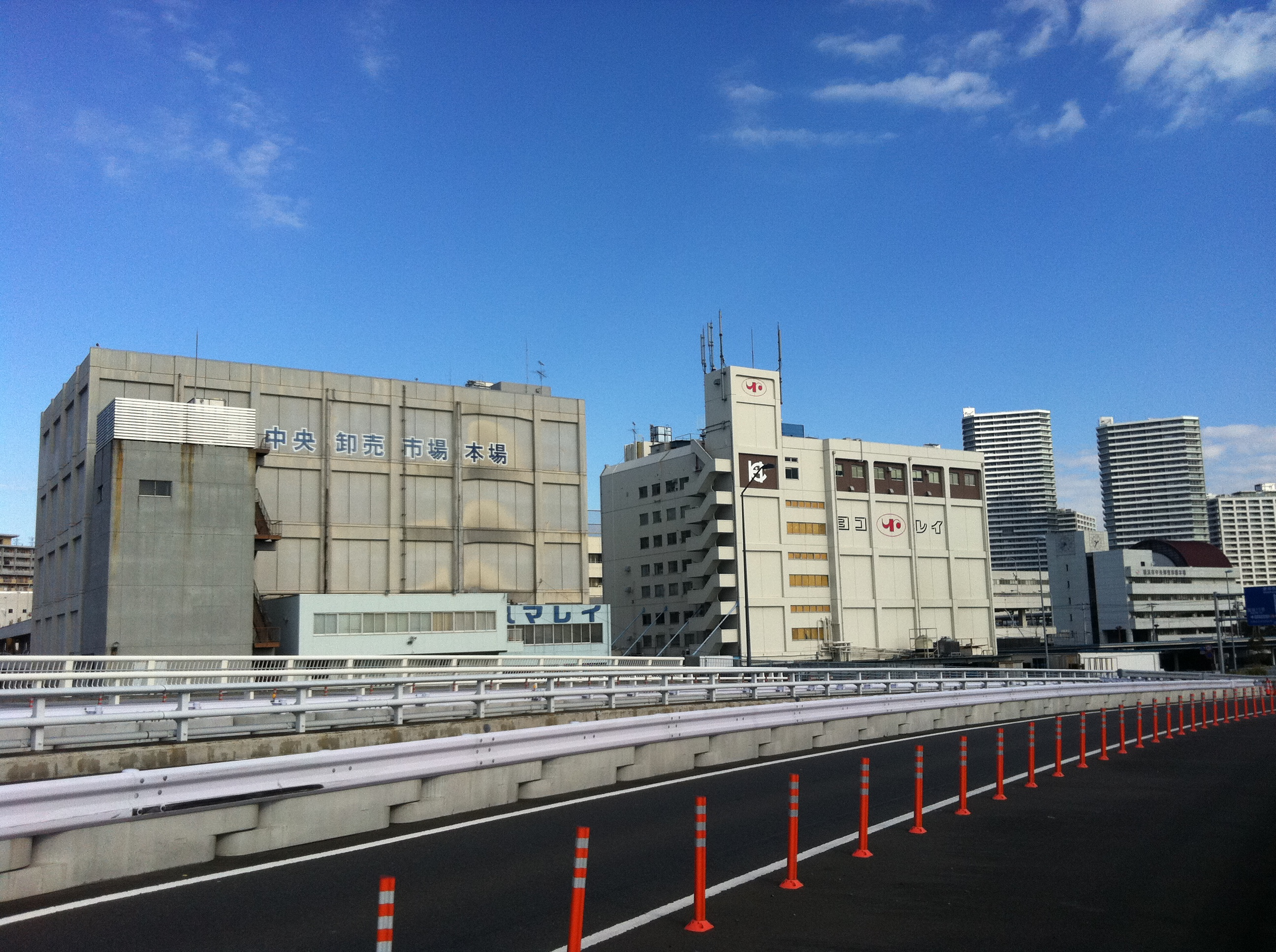 横浜市中央卸売市場本場、みなとみらい橋から撮影。